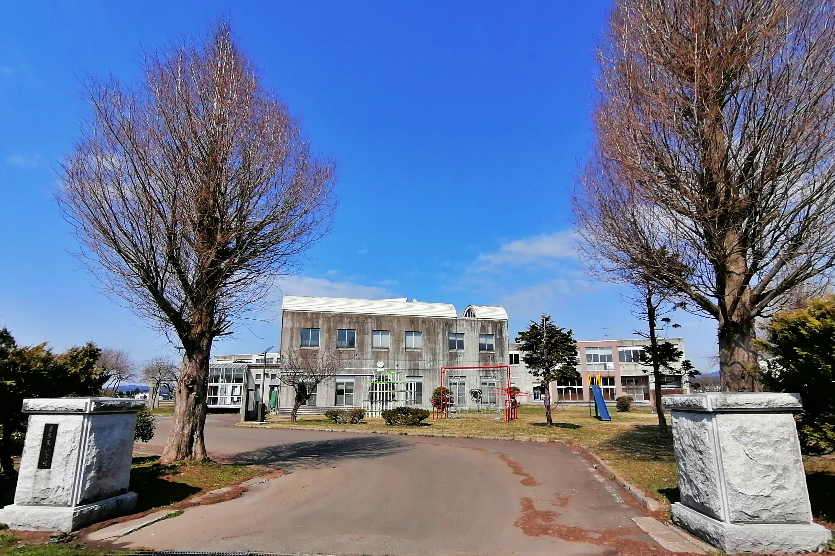 北秋田市立鷹巣東小学校